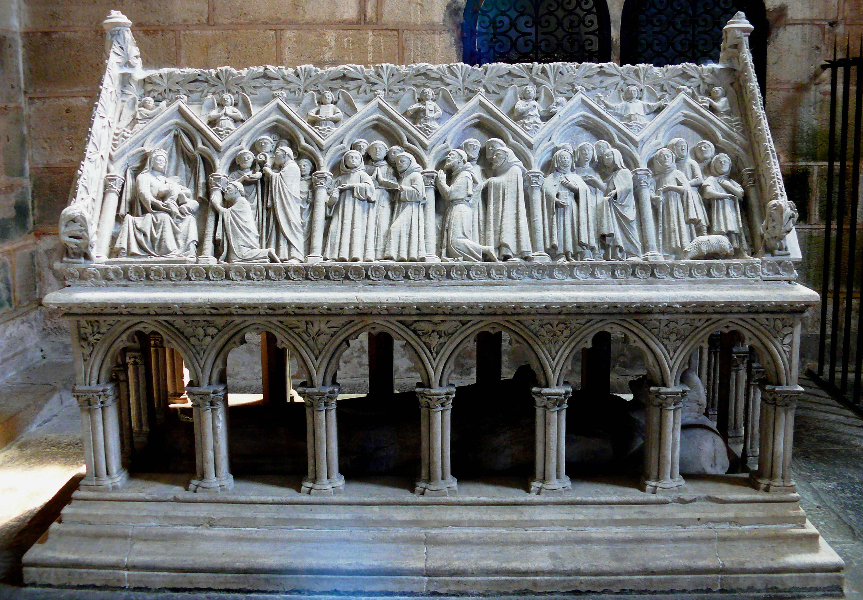 Abbaye d'Aubazine - Tombeau de saint Etienne